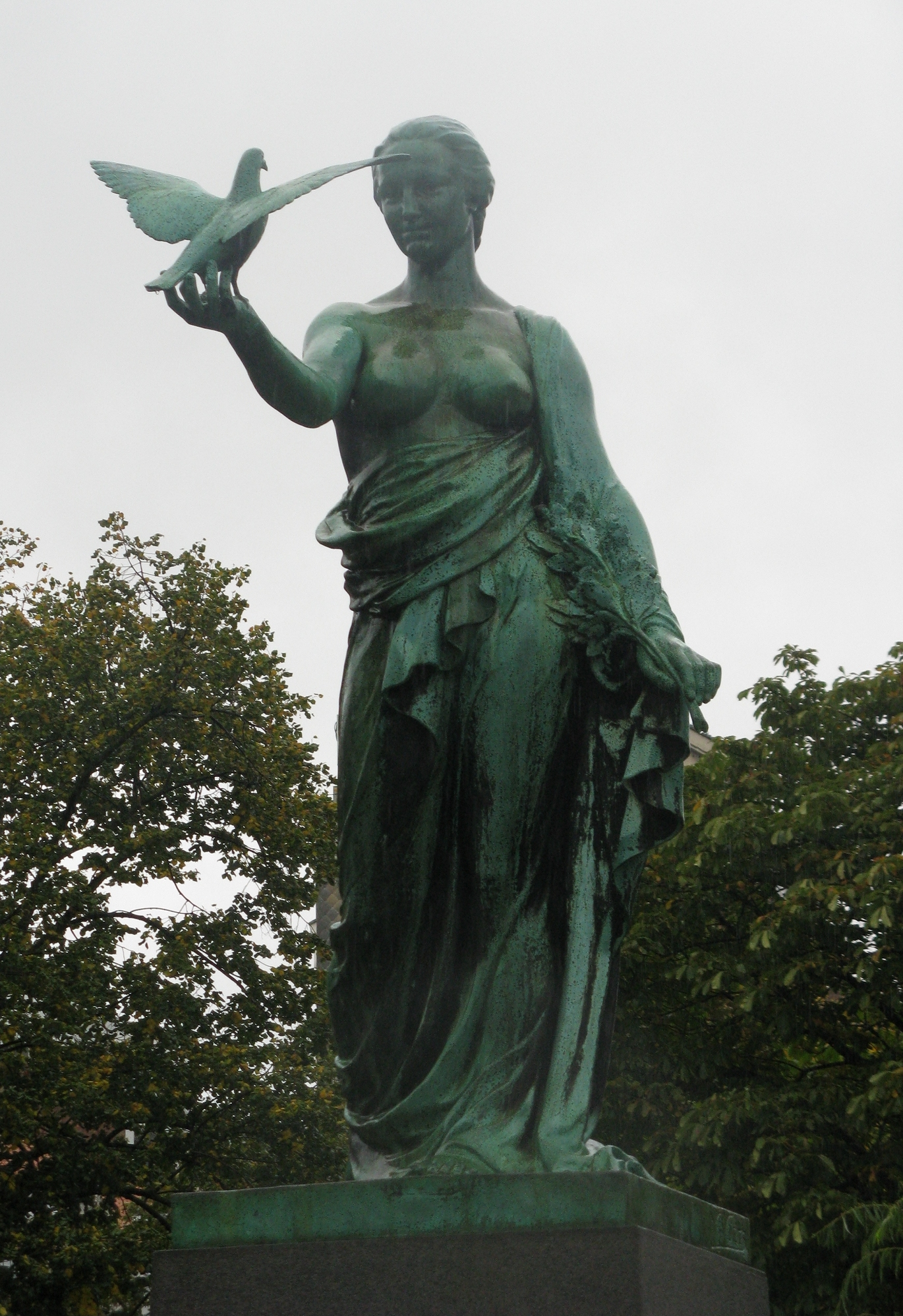 Belgian Monument in Honor of Carrier Pigeons during 1914-1918